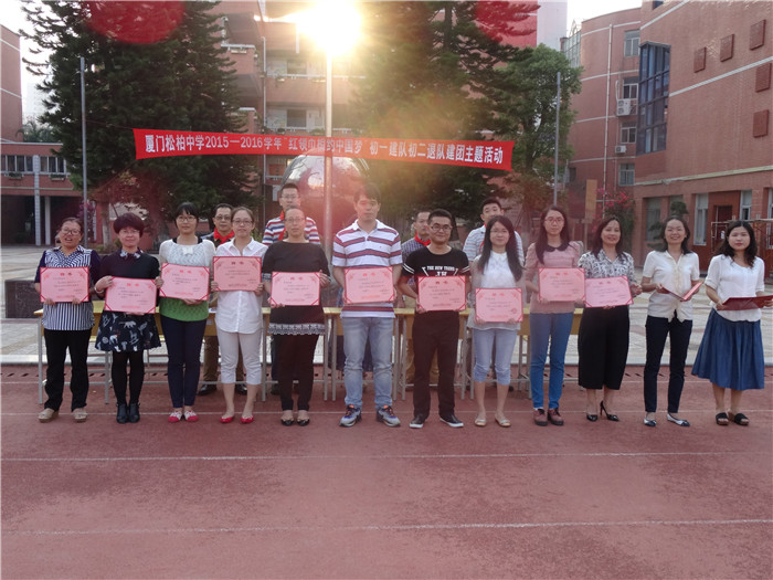 厦门松柏中学初中部举行退队建团主题活动。